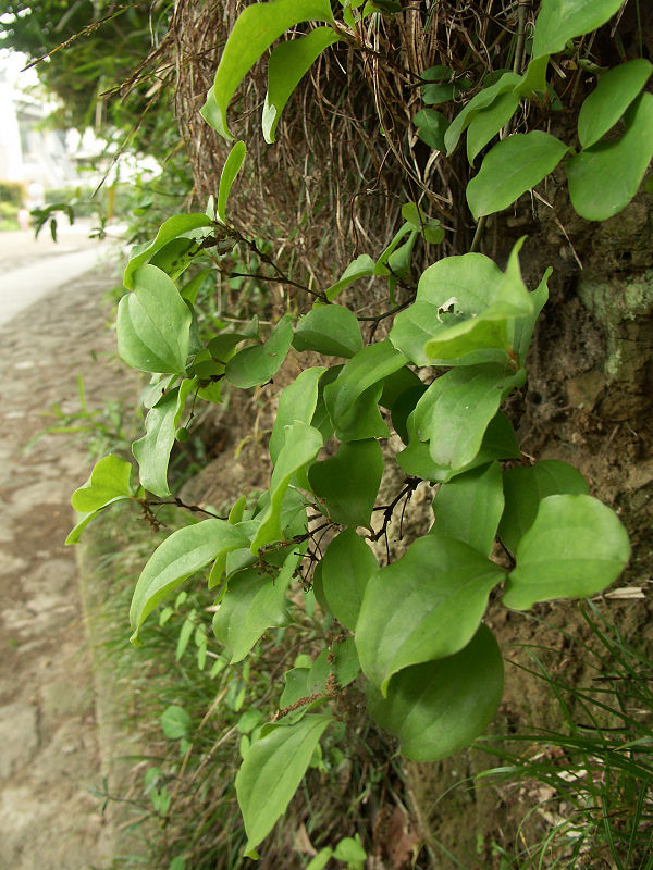 崖からぶら下がって葉を広げている様子。